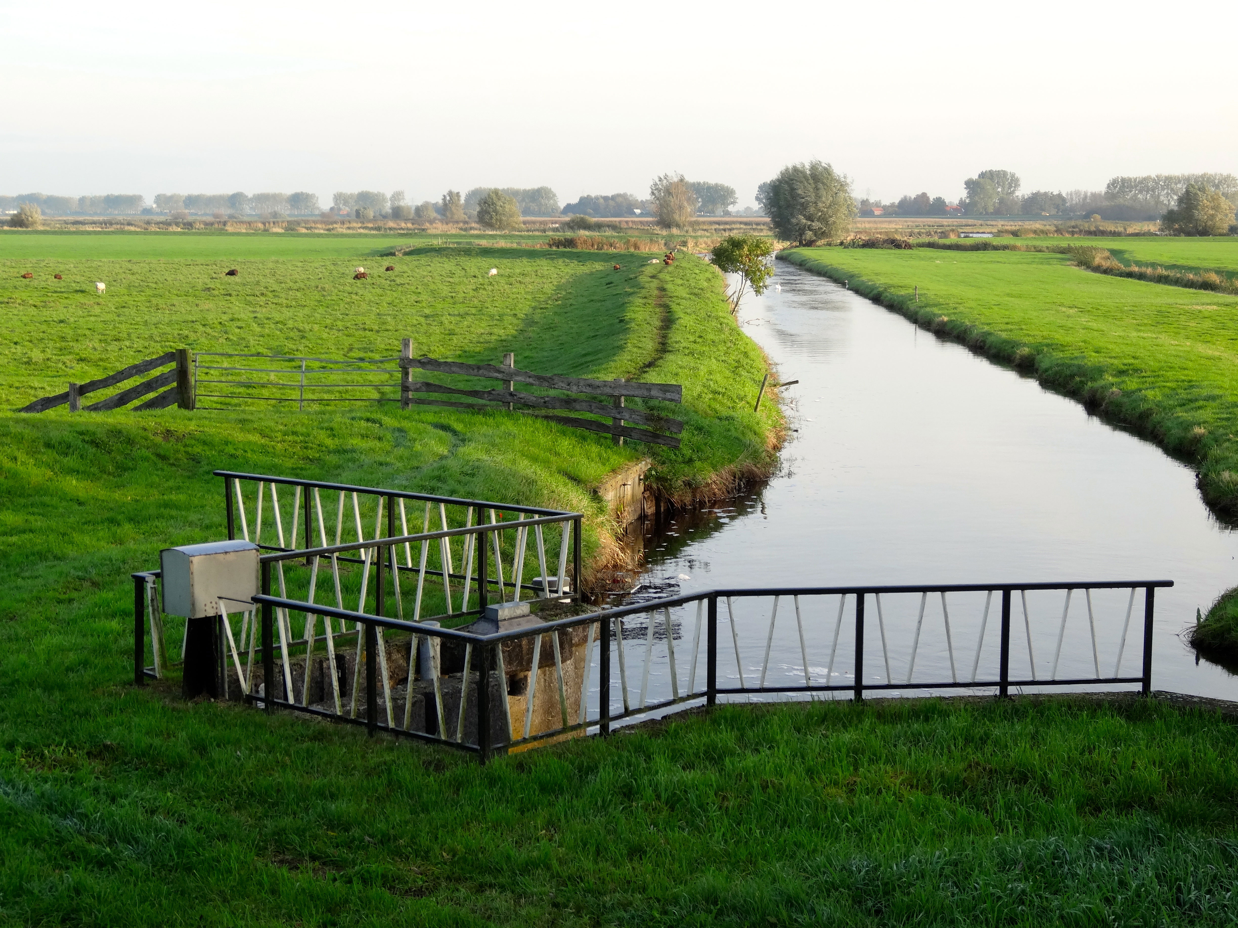 Buitendijksland langs het Zwarte Water gezien vanaf de Mastenbroekerdijk, nabij gemaal Genemuiden